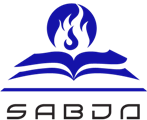 Logo SABDA